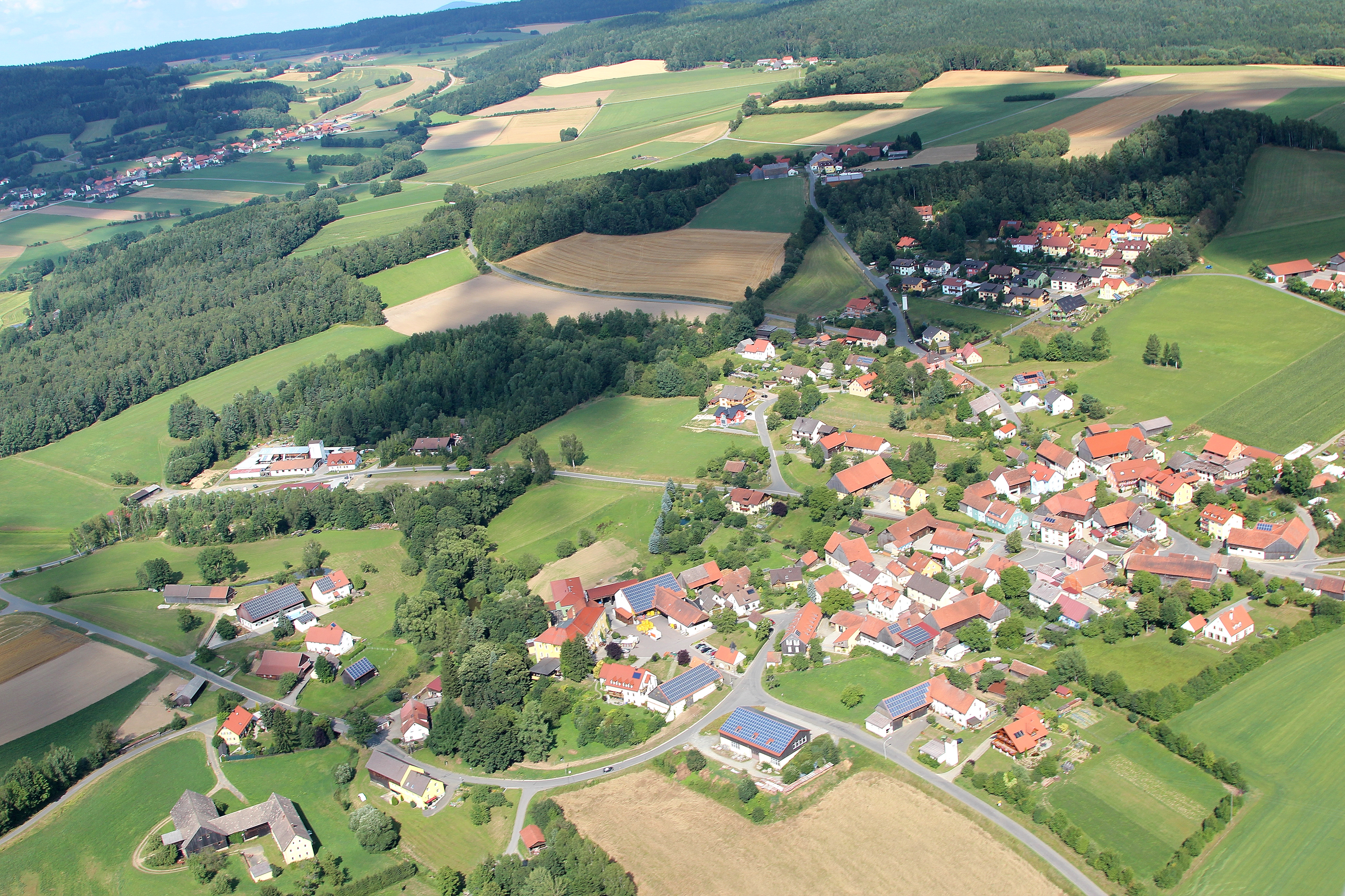 Fuchsberg, Gemeinde Teunz, Landkreis Schwandorf, Oberpfalz, Bayern (2013)